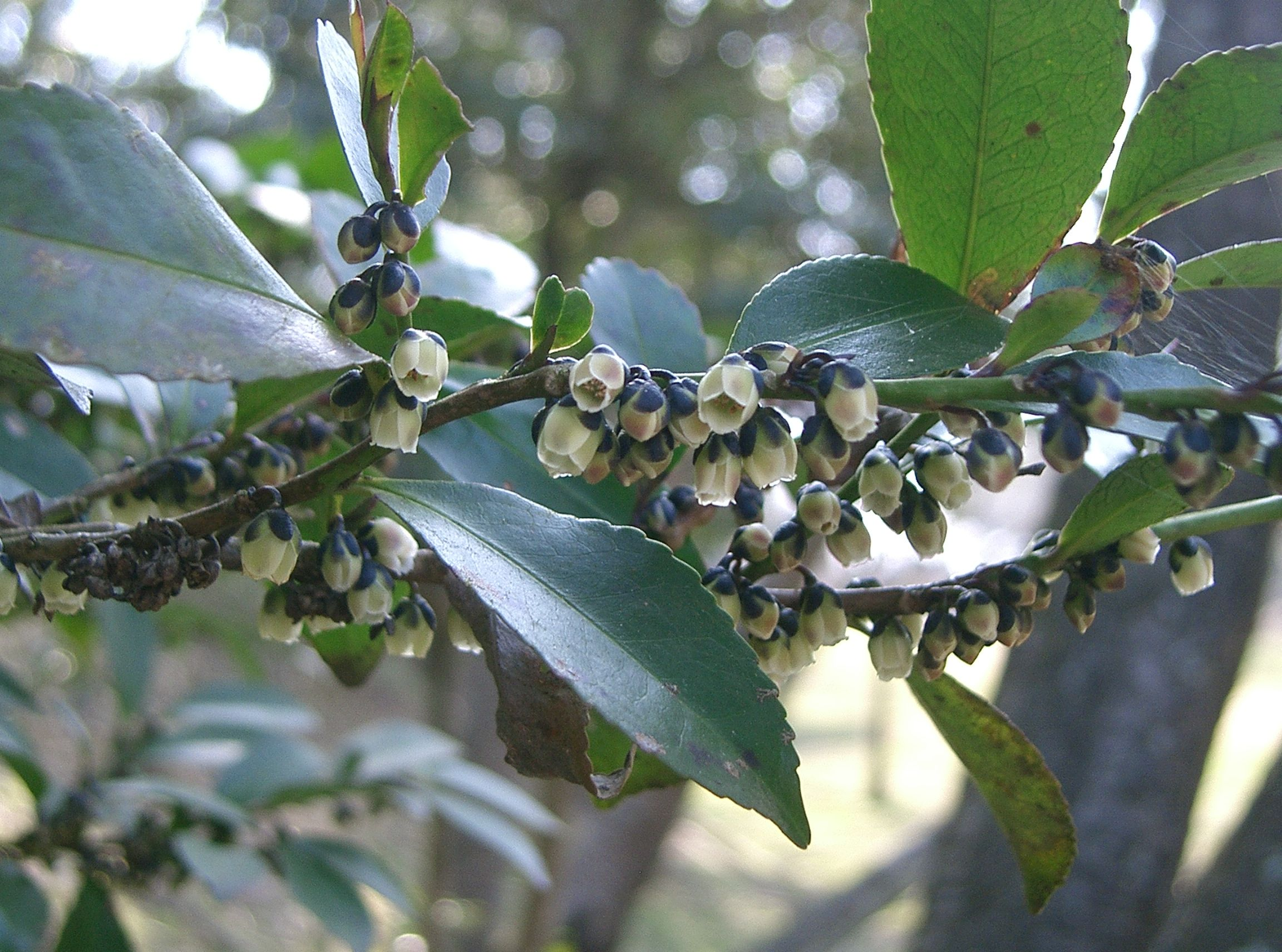 Eurya japonica